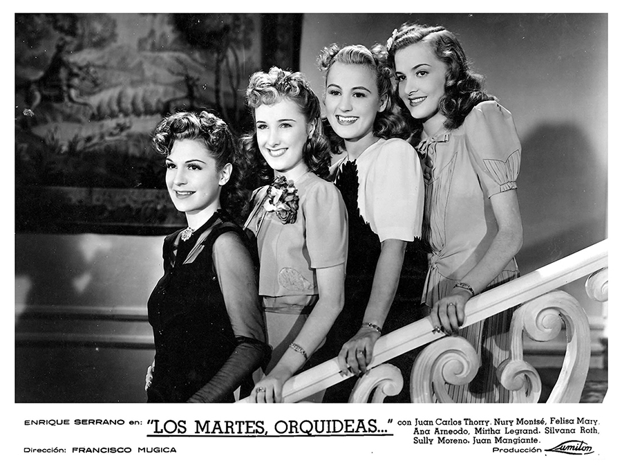 En hilera en una escalera, de izquierda a derecha: Zully Moreno, Mirtha Legrand, Nury Montsé y Silvana Roth en la película Los martes, orquídeas.